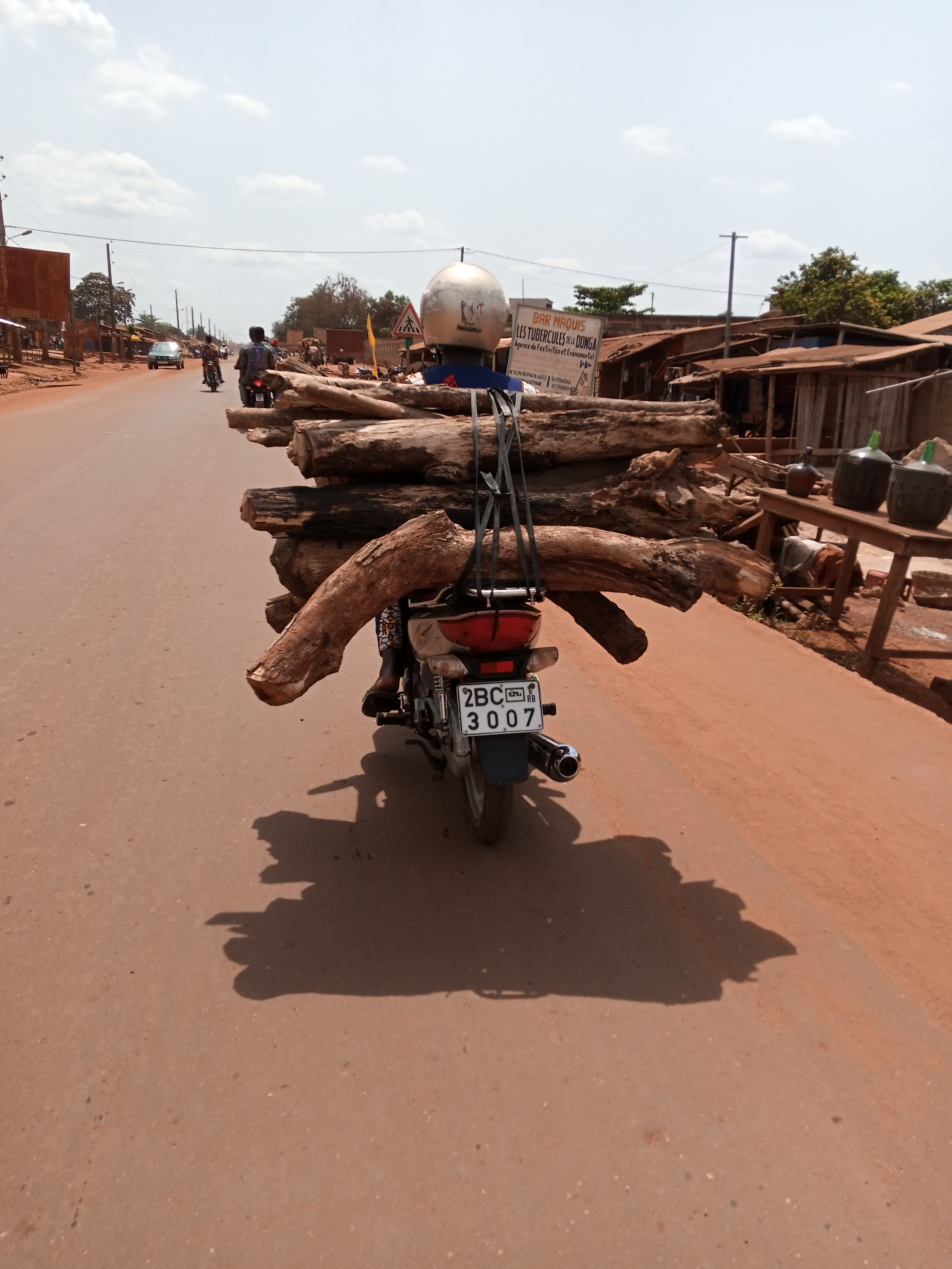 le transport de bois à Pobé This is an image with the theme "Africa on the Move or Transport" from: Benin